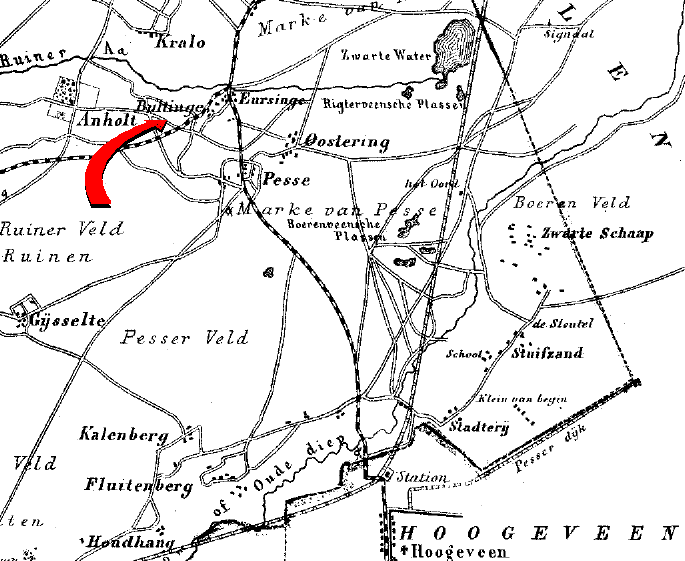 Fragment met Bultinge van een kaart van Ruinen (de plaats van Bultinge door mij met rode pijl gemarkeerd)